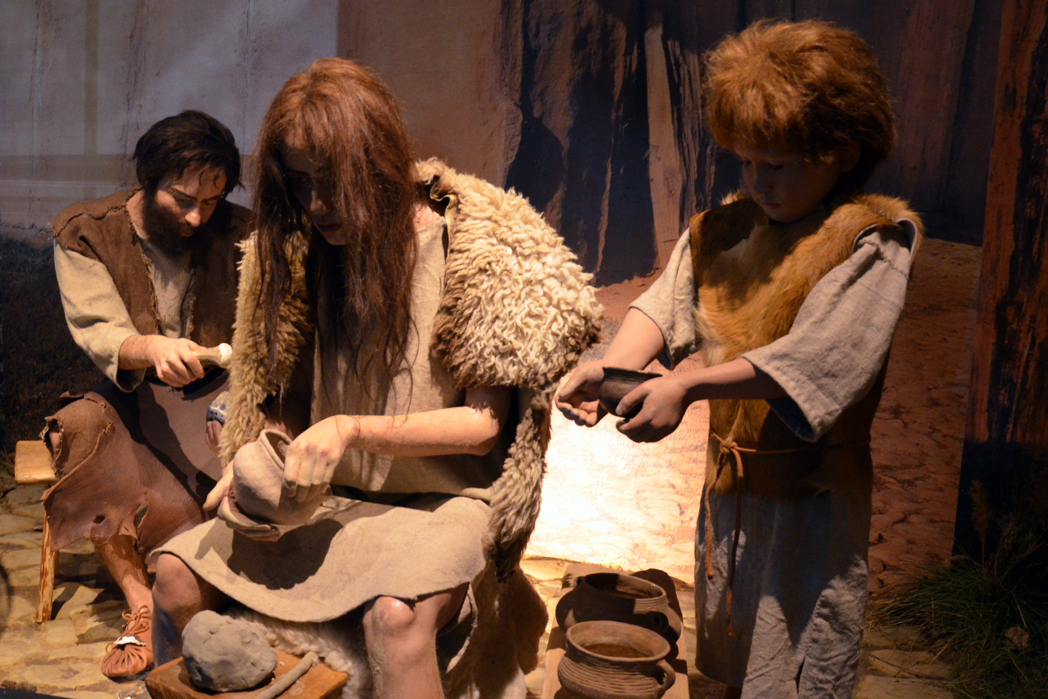 Tracht der Bronzezeit, um etwa von 2100 bis 1650 v. Chr., Beskiden